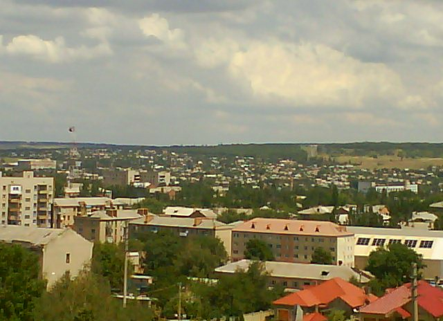 Панорама міста Бахмут. 2008 рік.